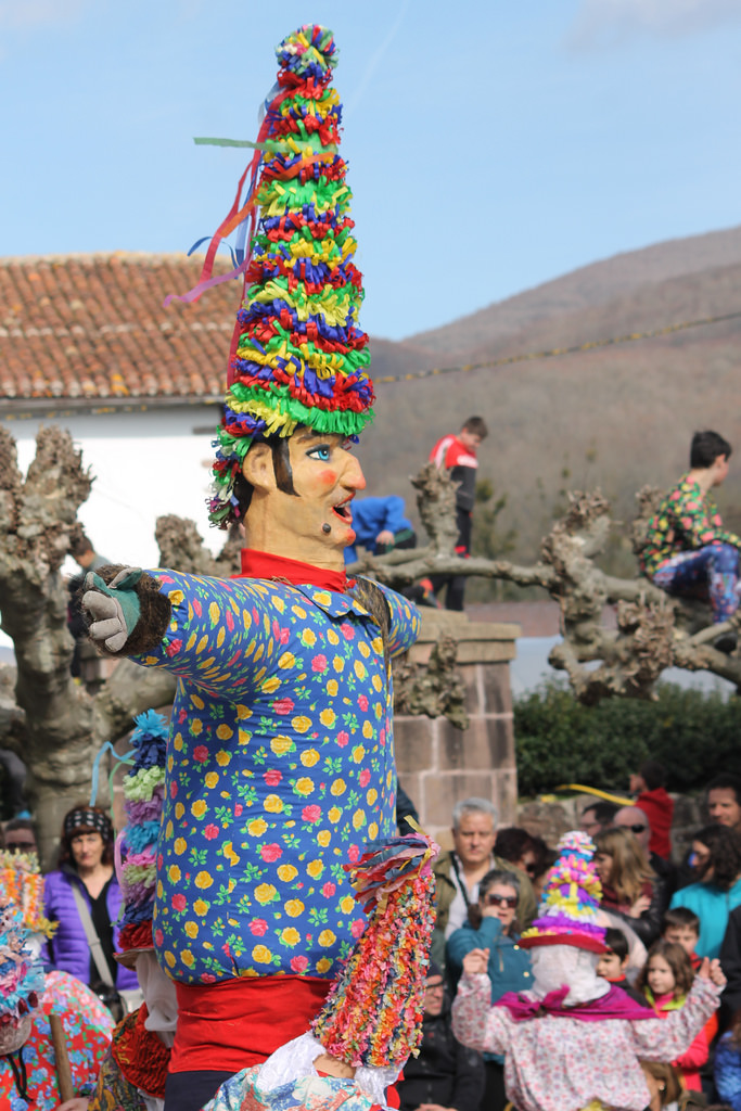 Lantz Inauteriak 2017